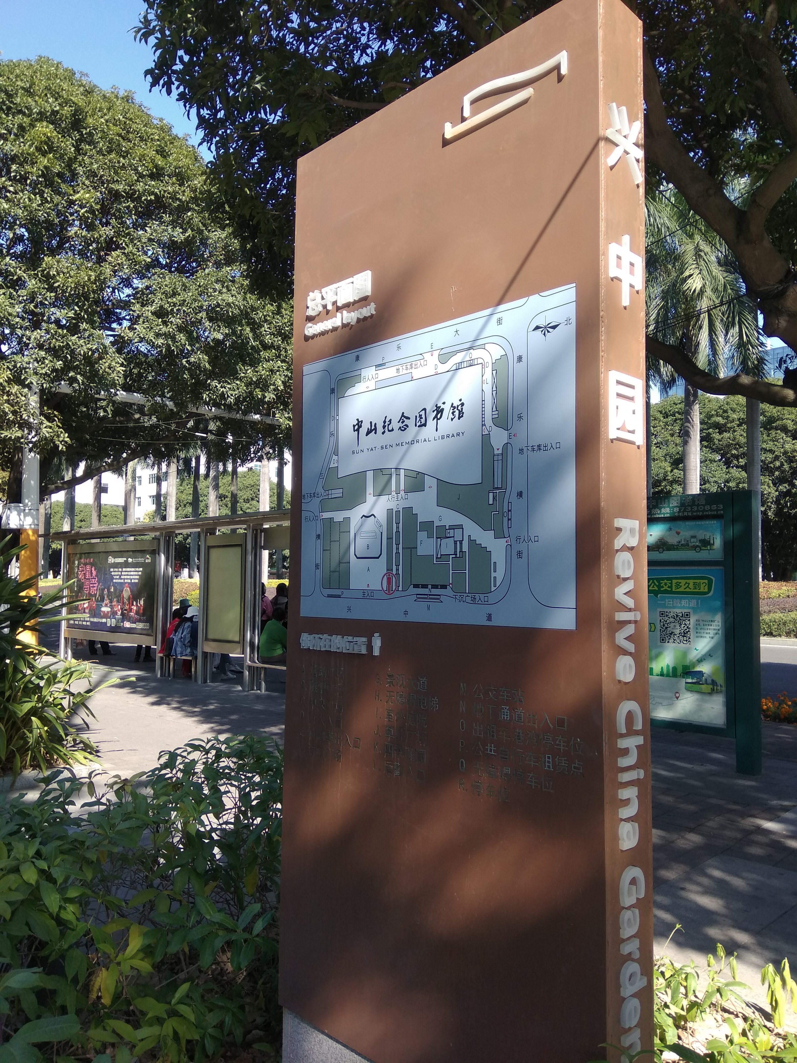 中文（中国大陆）: 中山纪念图书馆